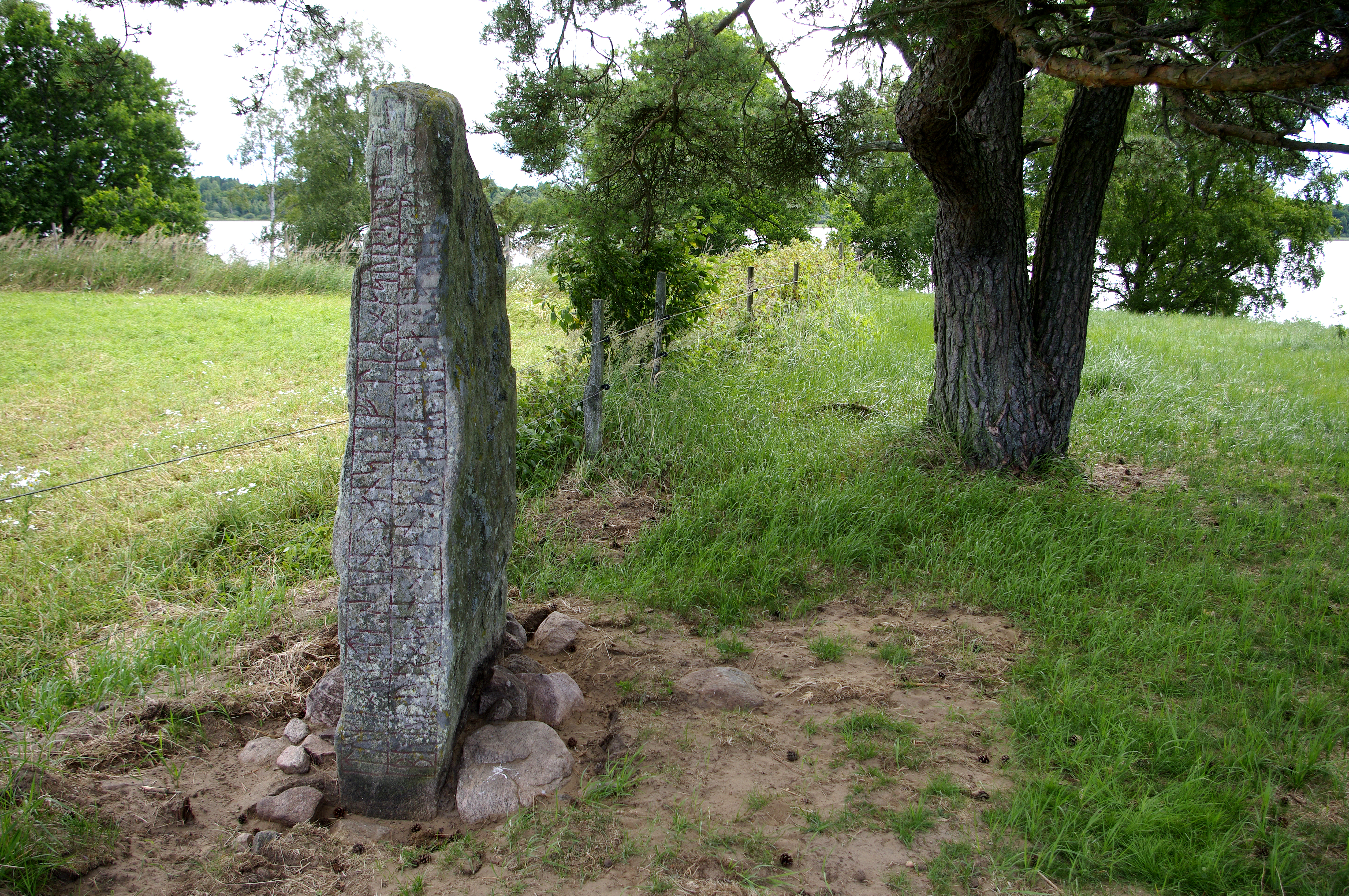 Rune stone Sm 42 at Ryssby, Småland, Sweden.